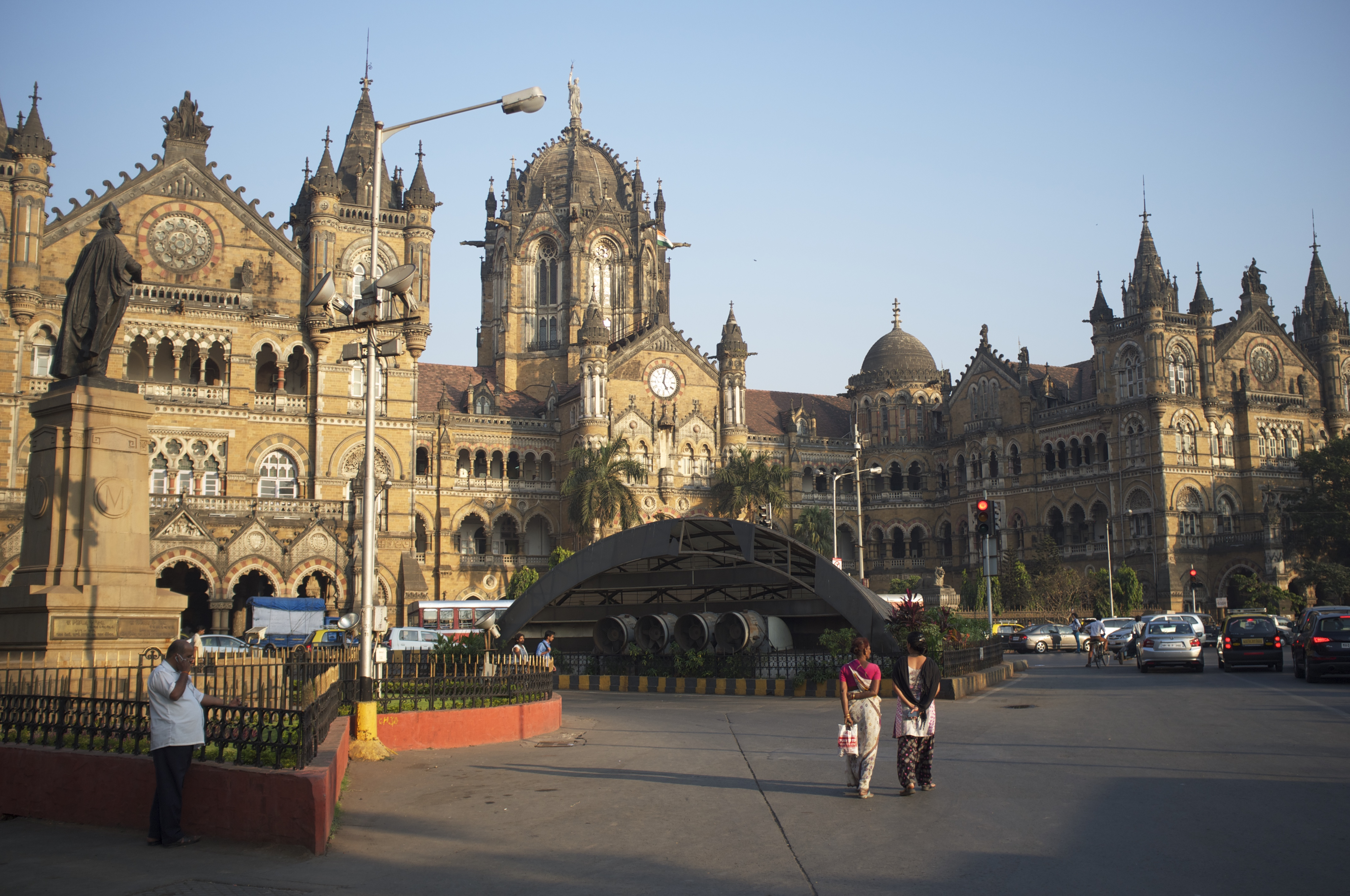 Victoria Terminus, Mumbai, India